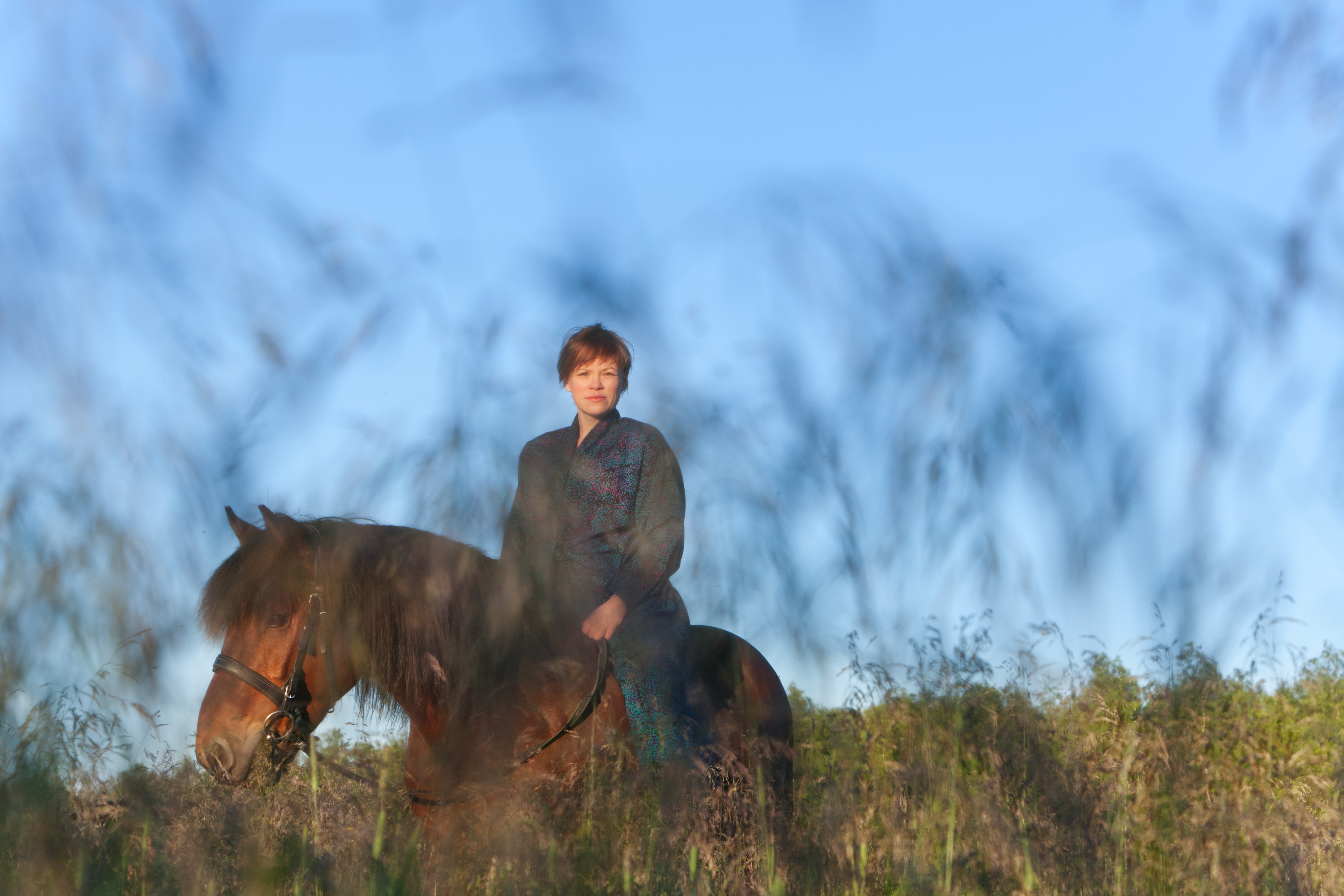 Essi Kummu ratsastaa.